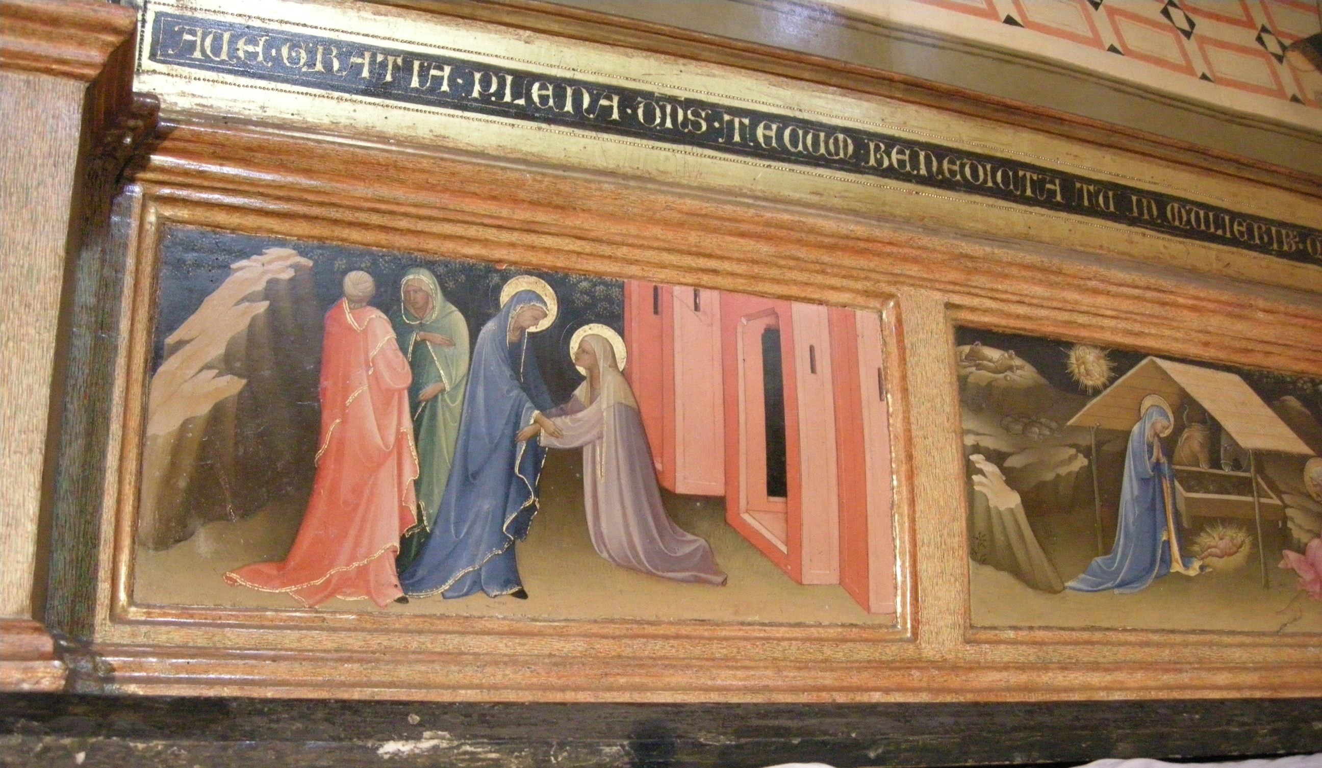 Cappella Bartolini Salimbeni, Firenze: Annunciazione di Lorenzo Monaco, predella: Visitazione.